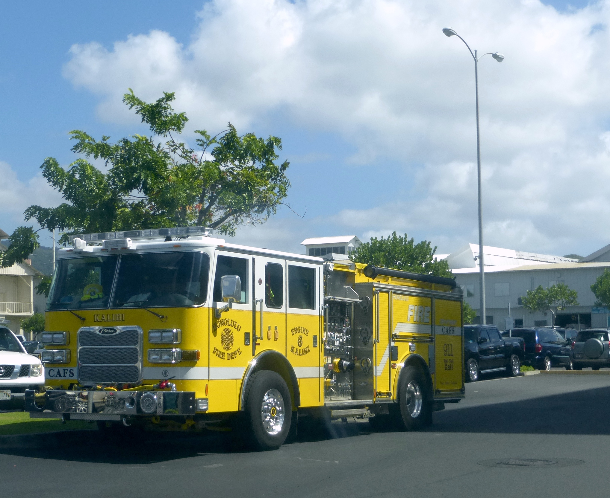 Honolulu Fire Department engine